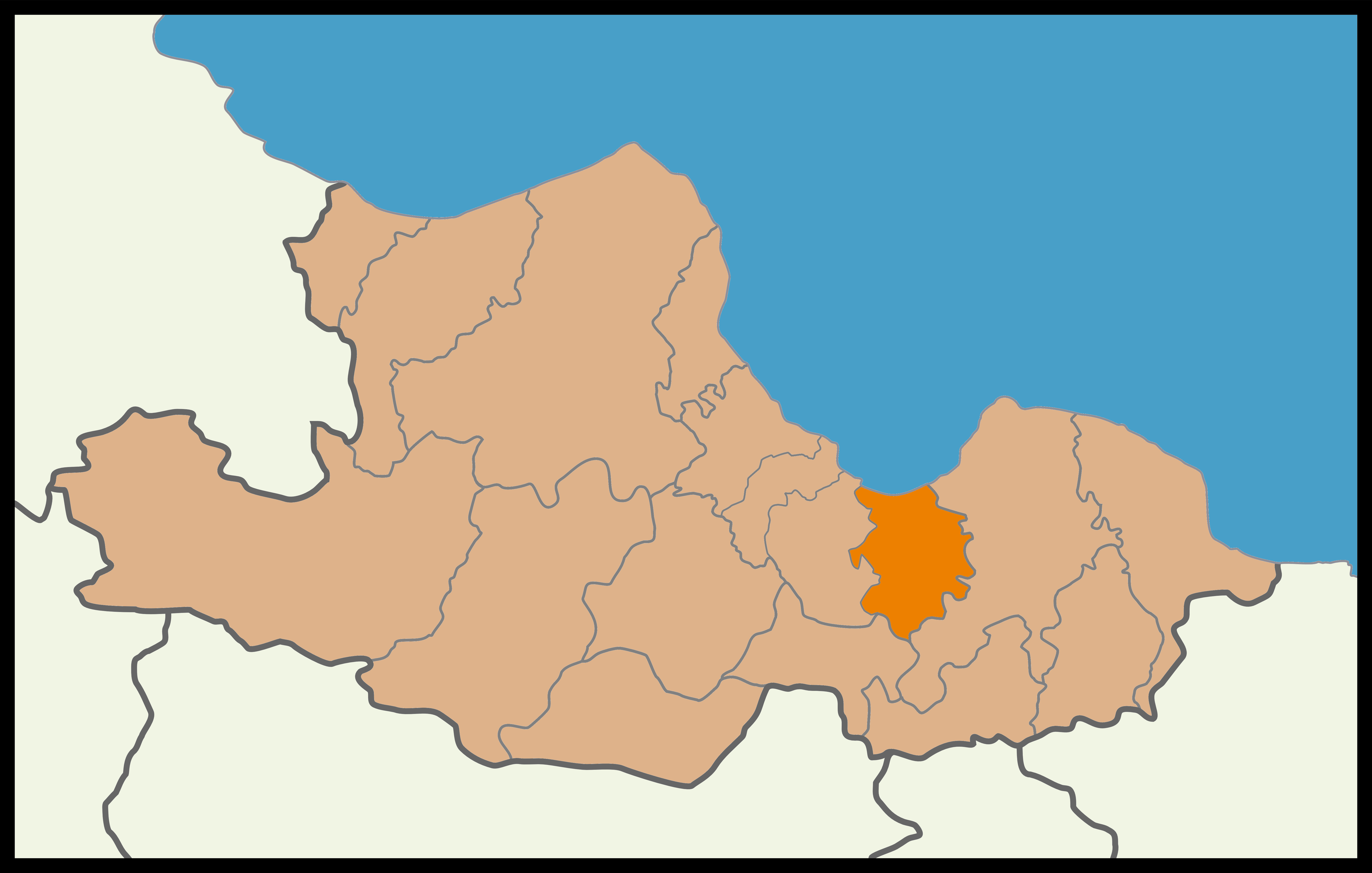 Samsun'un Tekkeköy ilçesinin 2015 Türkiye genel seçimleri haritası.